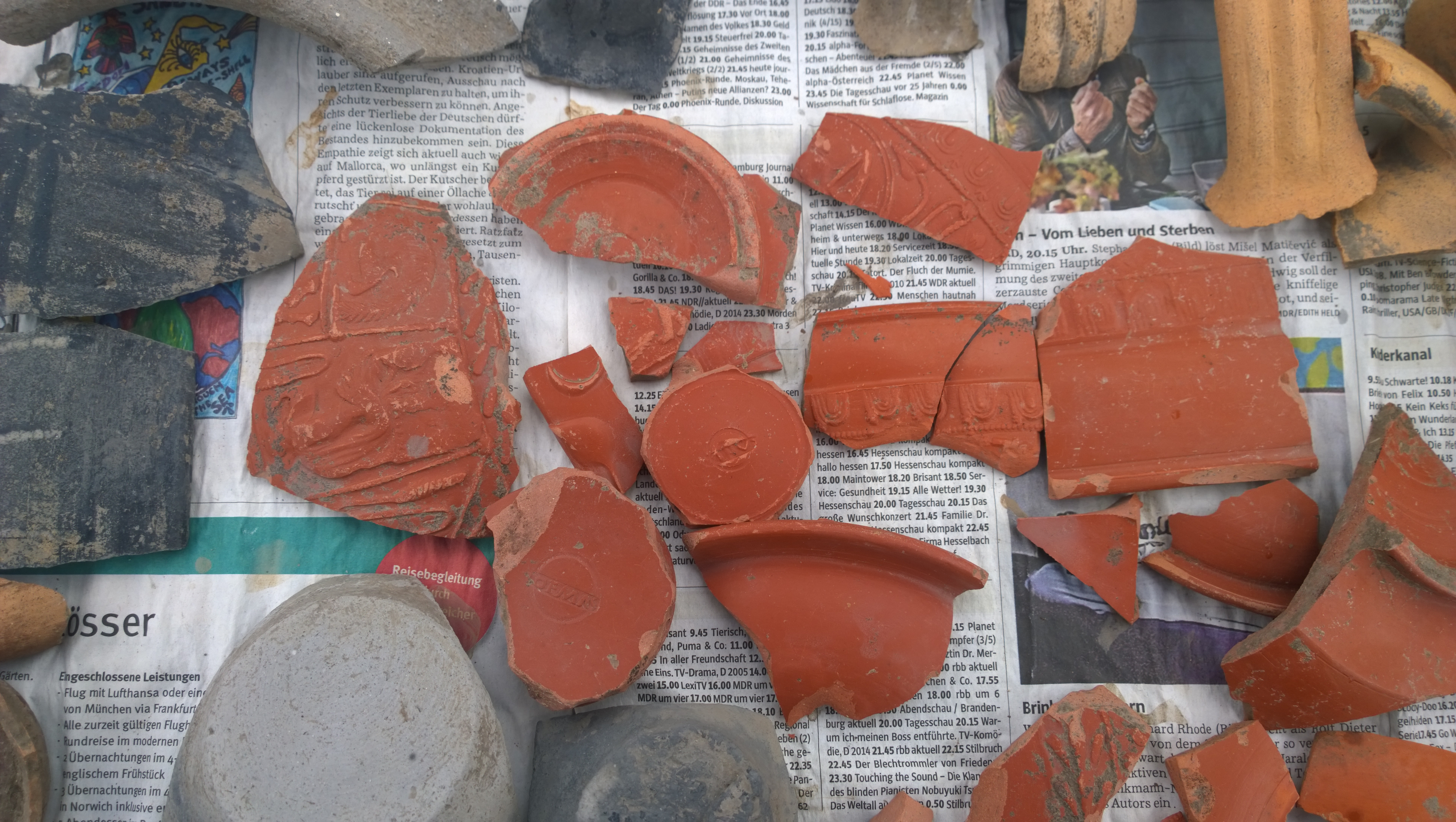 Beispiel römische reliefverzierte Terra Sigillata Grabungsfunde 2015 im Bereich Kastell Gernsheim / Vicus. Vor Ort Ausstellung zum Tag des Offenen Denkmals.